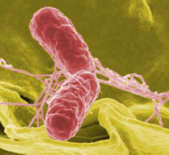 Salmonelle (image retravaillée provenant initialement de Commons)